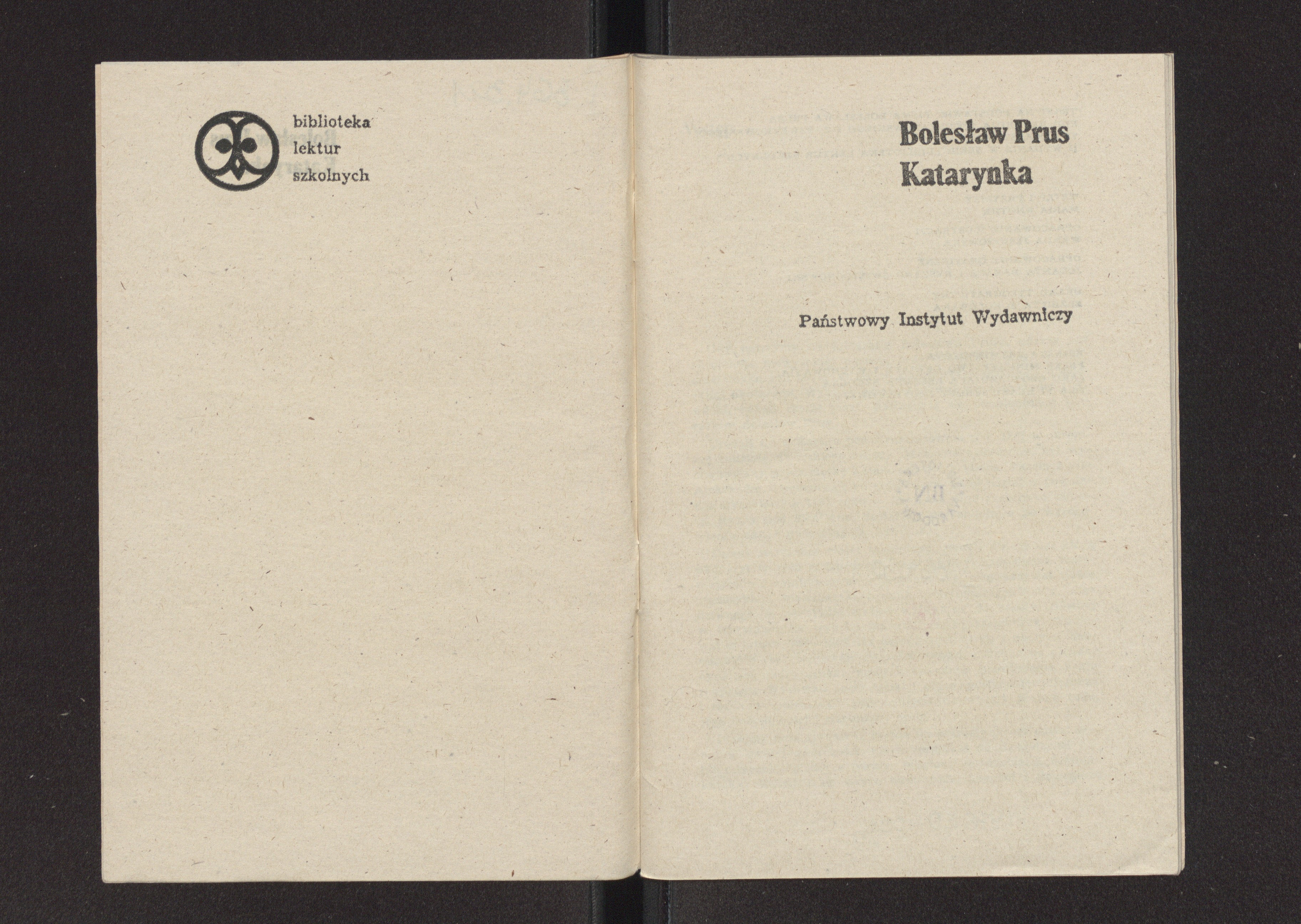 Katarynka wyd. 1975